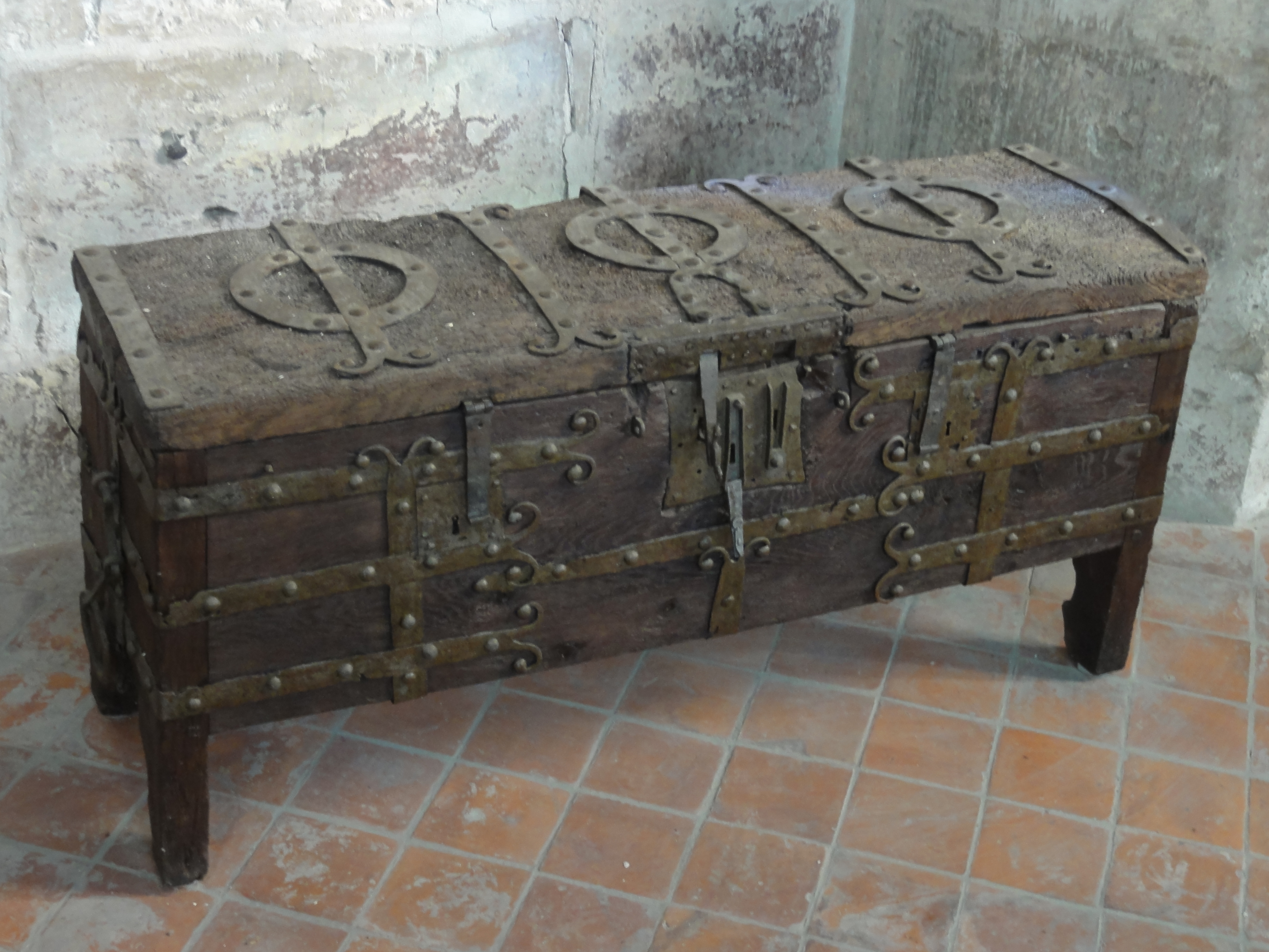 Coffre de la fabrique du trésor de l'église, datant du Moyen Âge.